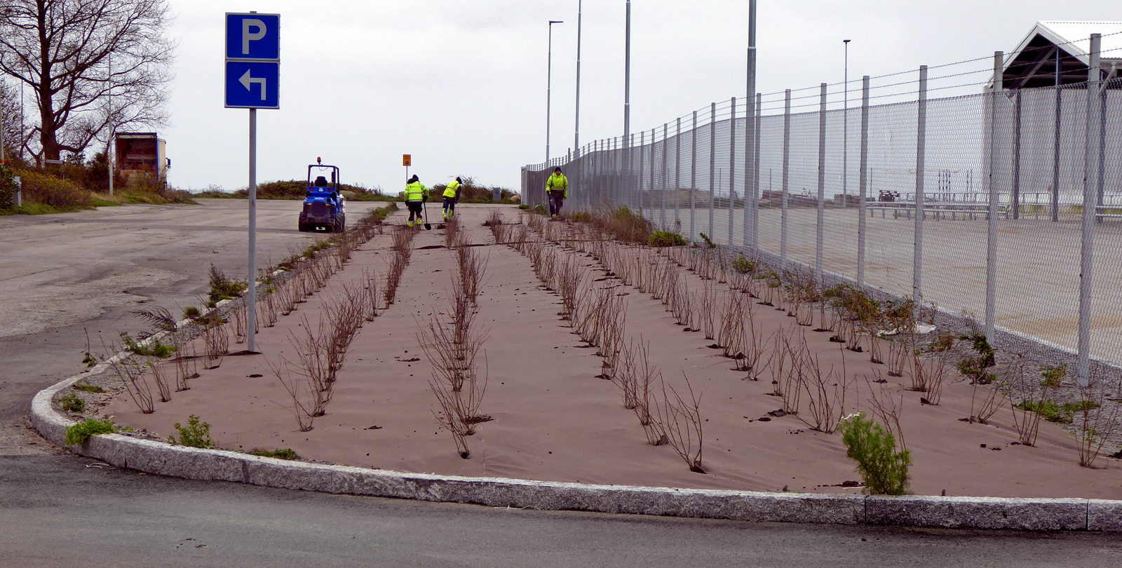 Plantering av buskar längs Dragongatan vid Världens ände i Ystad 28 okt 2017.